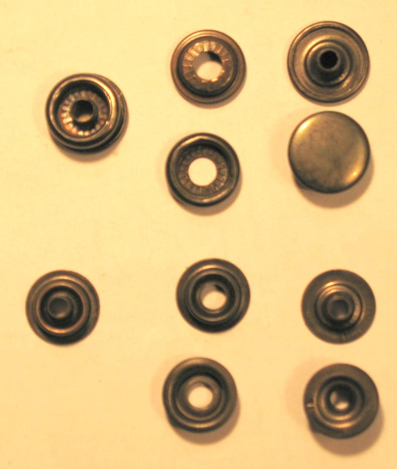 Druckknöpfe zum Schlagen Napa